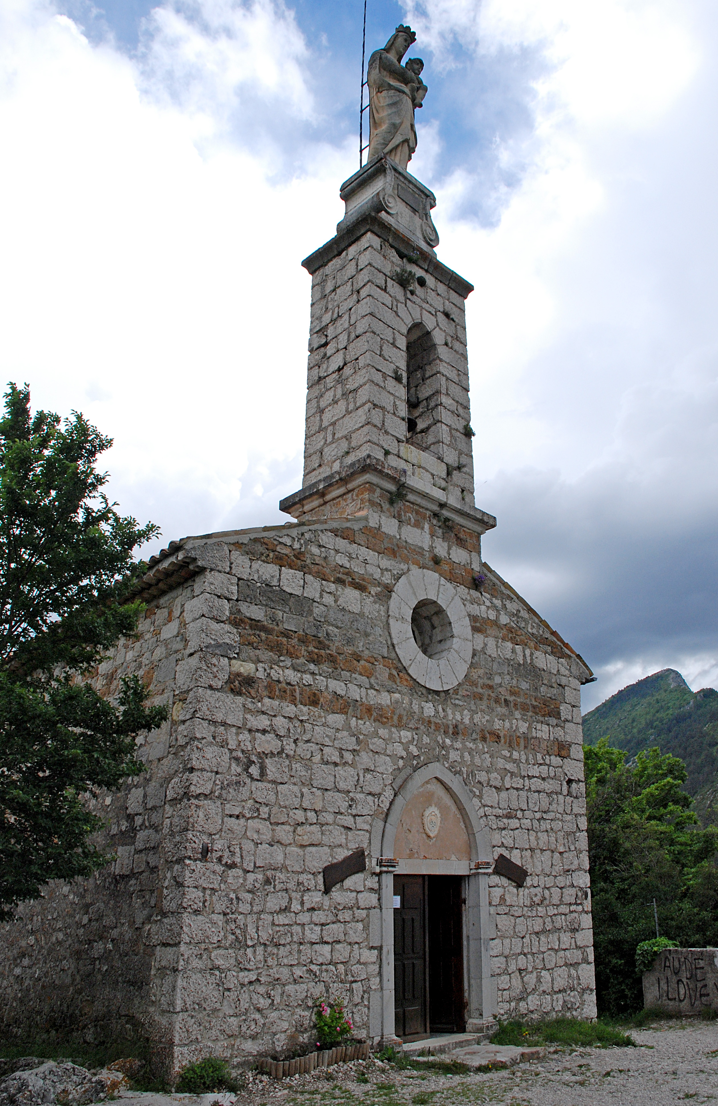 Castellane, Chapelle Notre Dame du Roc